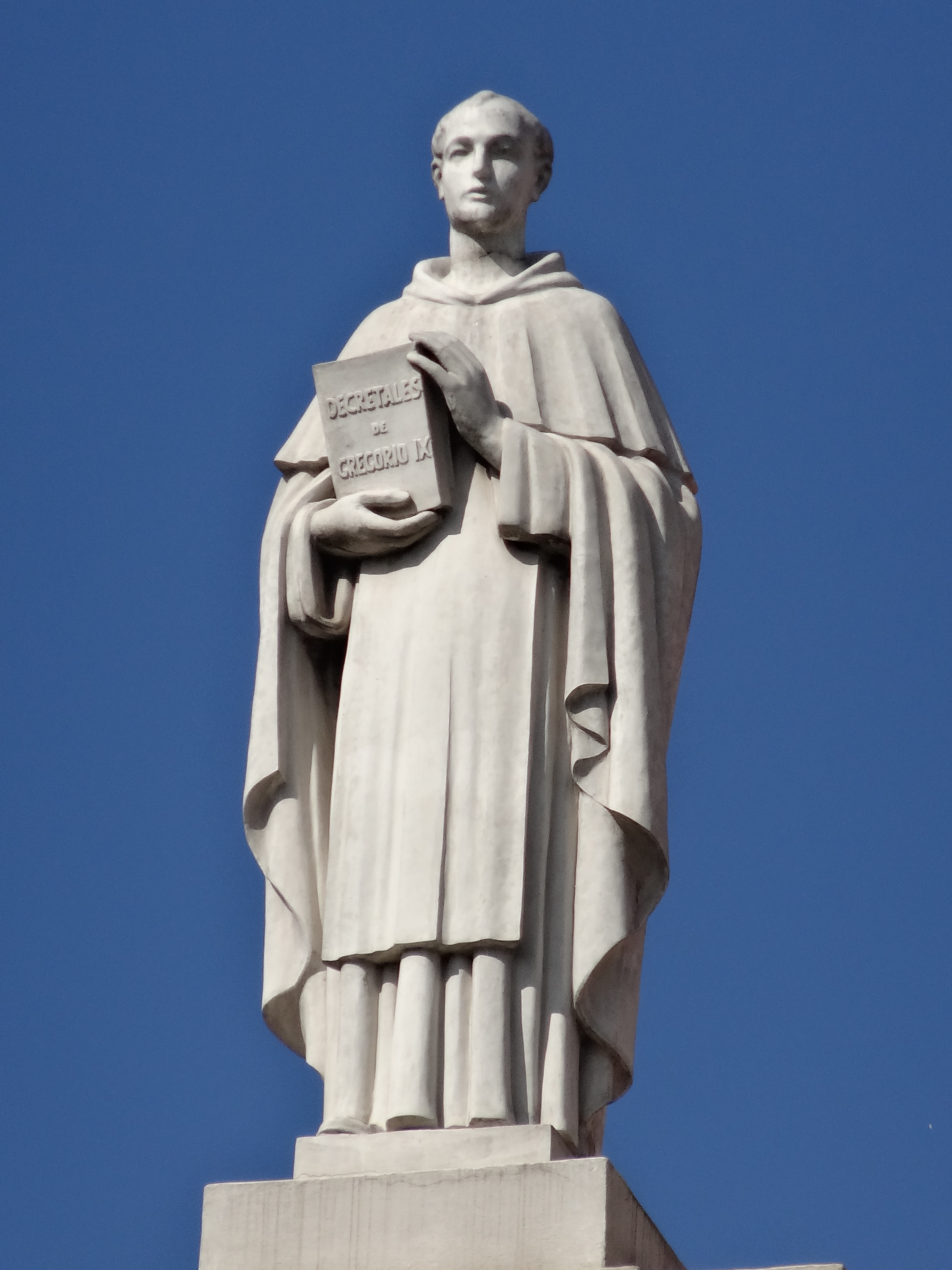 Estàtua de sant Ramon de Penyafort. Obra de Jaume Duran al Palau Casades (Barcelona). This is a photo of public art indexed in the cataloge Art Públic of Barcelona (Spain) under the code number 222010-1 (prefixed with territorial id: 08019/222010-1)